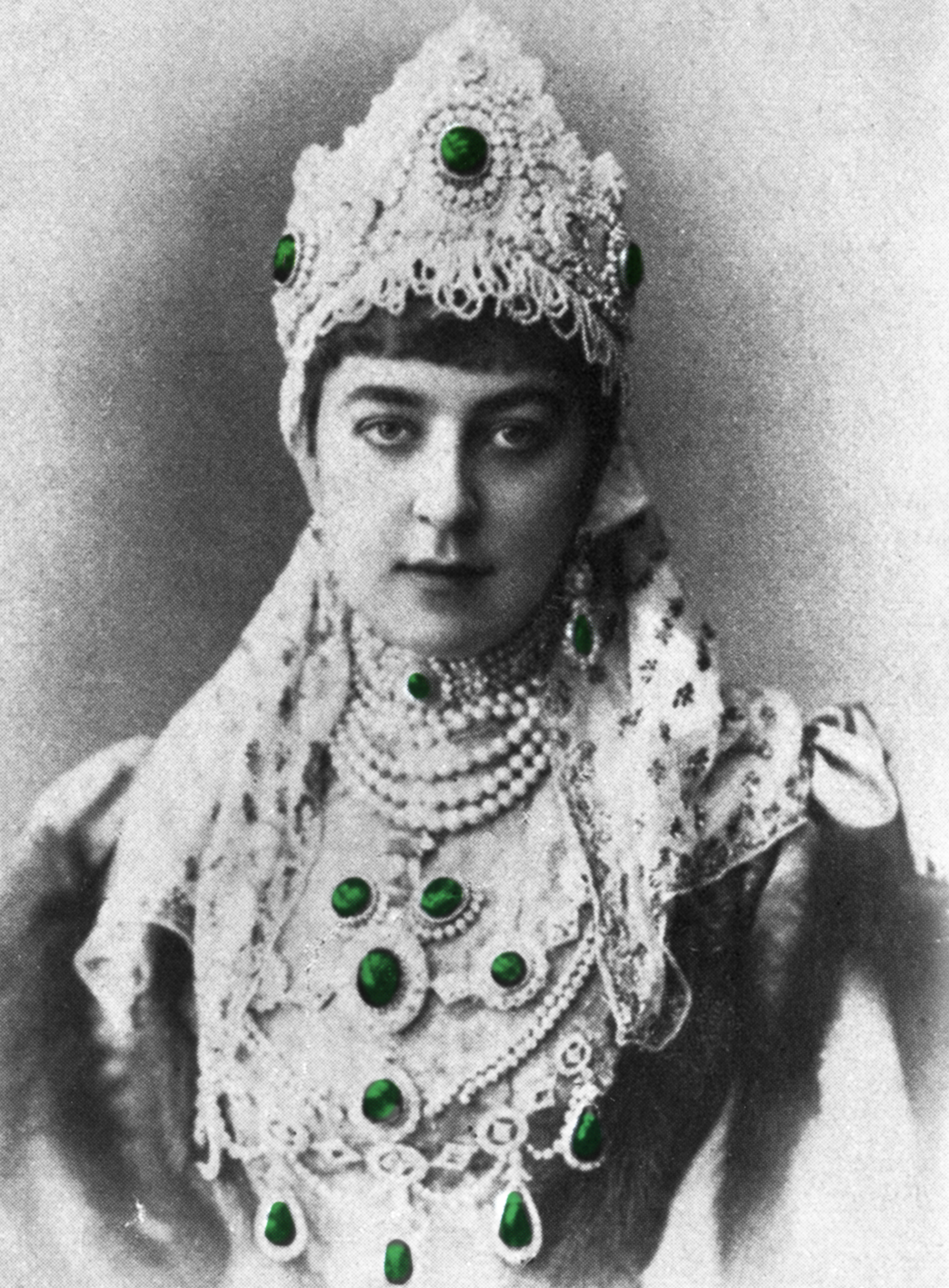 Зинаида Дмитриевна Скобелева (1856-1899),младшая дочь Ольги и Дмитрия Скобелевых. С 1878 года графиня Богарнэ, герцогиня Лейхтенбергская с 1889 года.